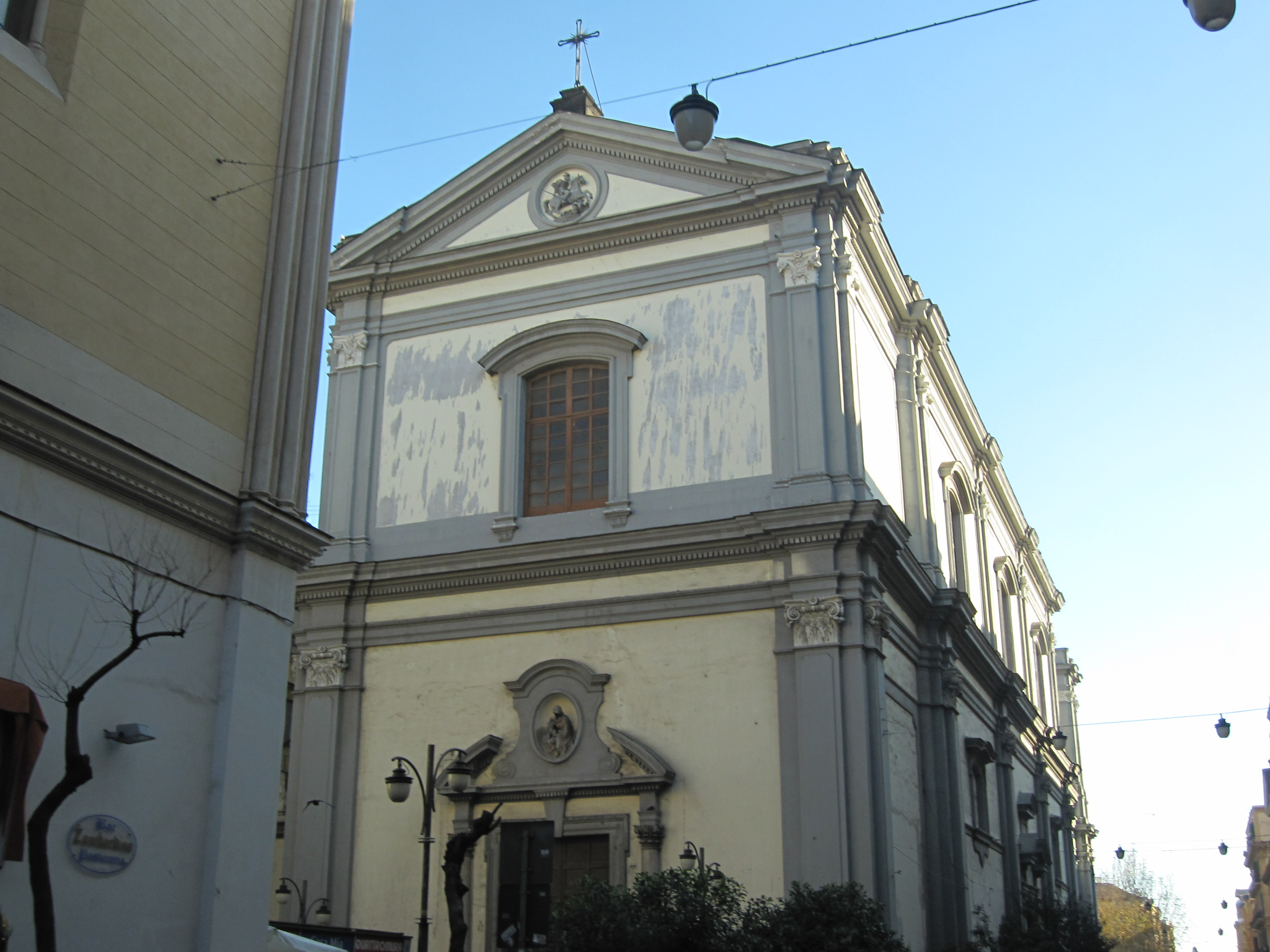 Chiesa di San Giorgio Maggiore (Napoli)